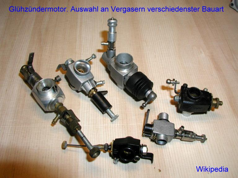 Glühzündermotor